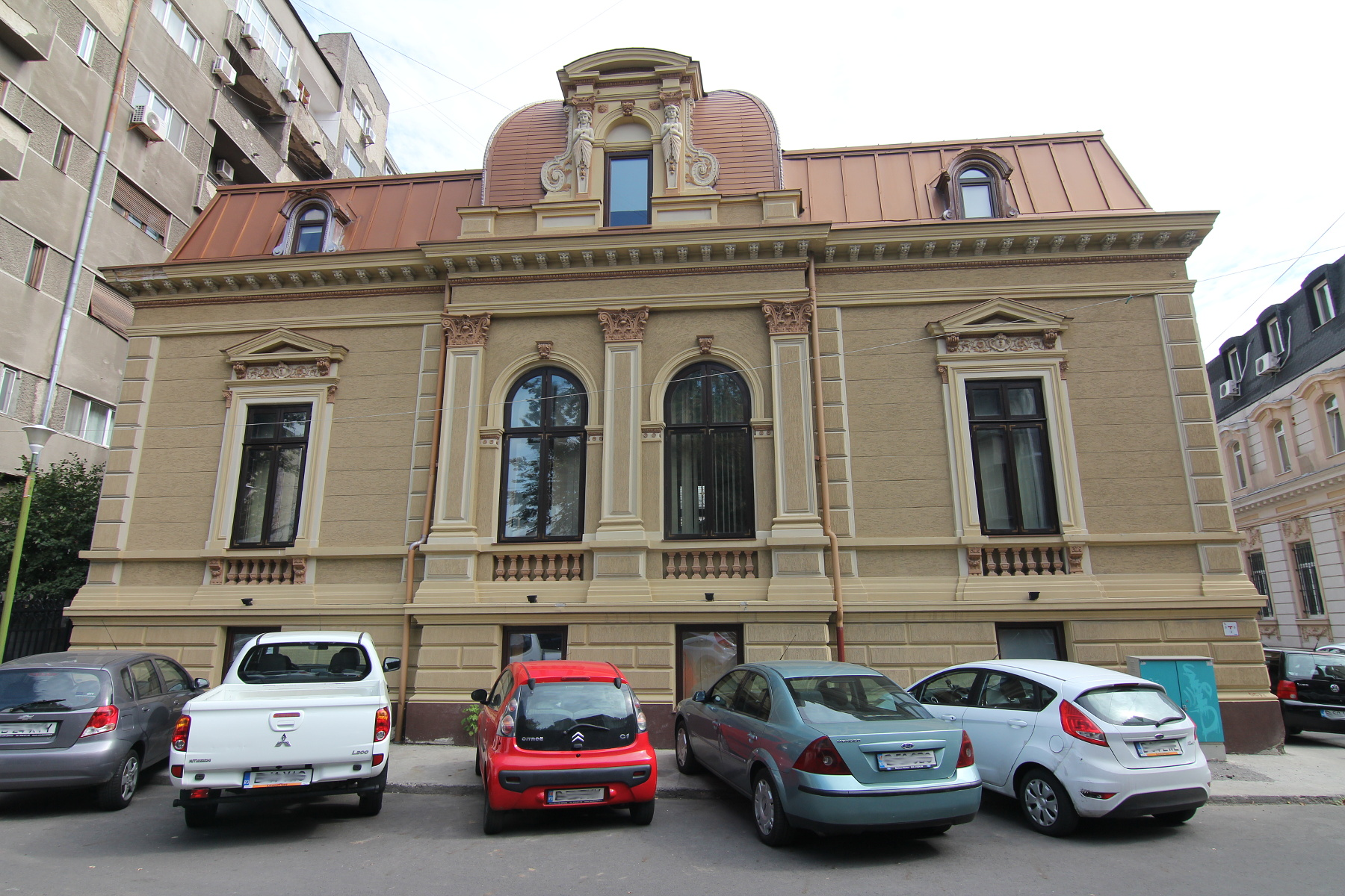 Casă pe Stelea Spătarul